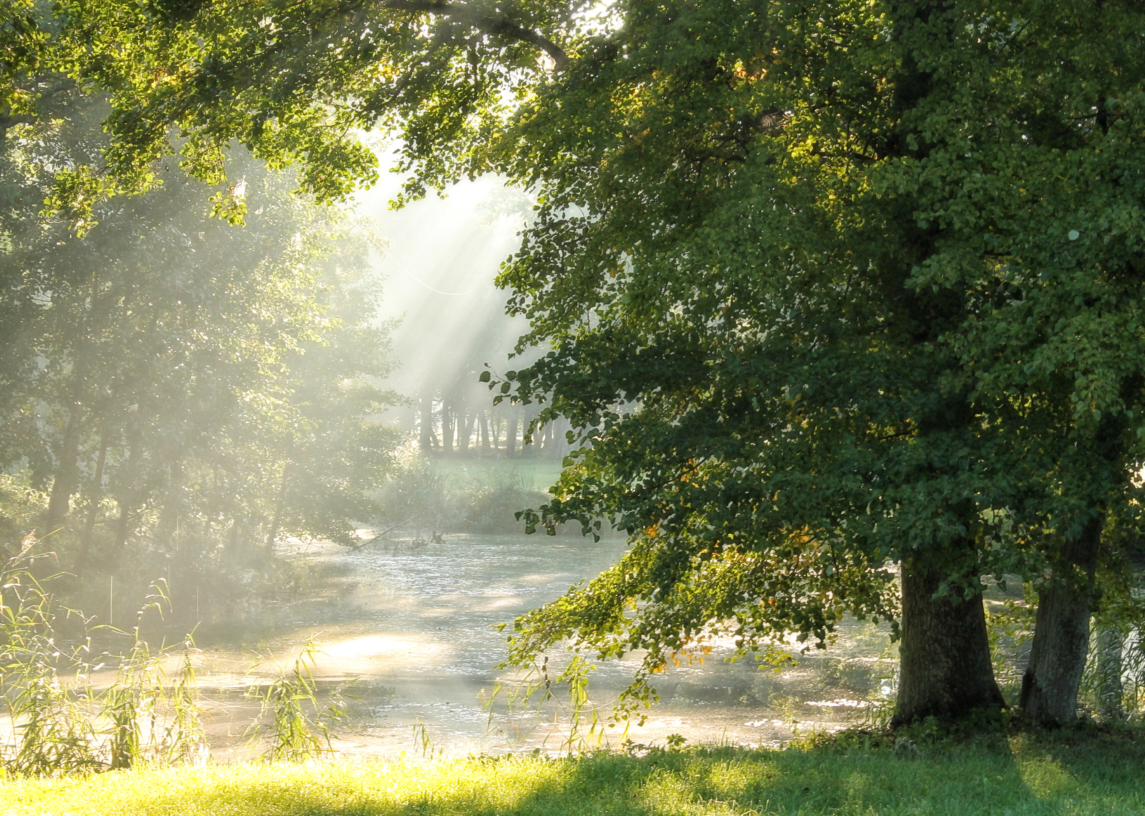 Septembrihommik Uuemõisa pargitiigi kohal. Ridala vald, Läänemaa